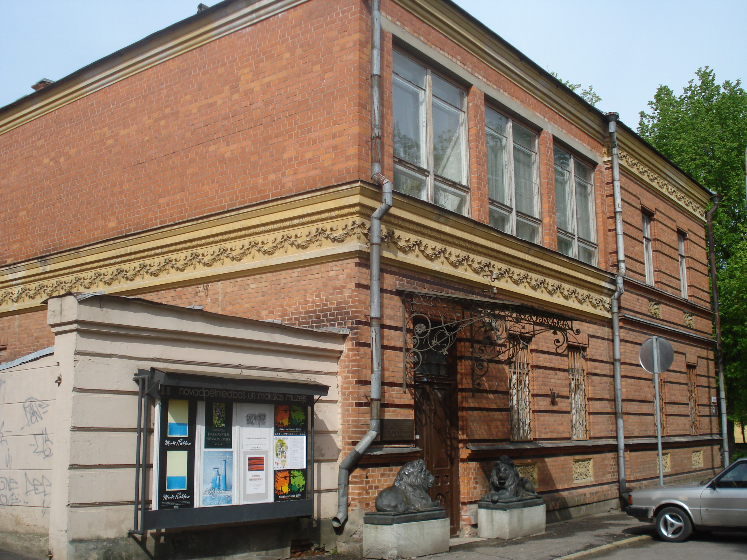 Daugavpils Local Arts and History Museum. Daugavpils noradpētniecības un mākslas muzejs. Rīgas iela 8